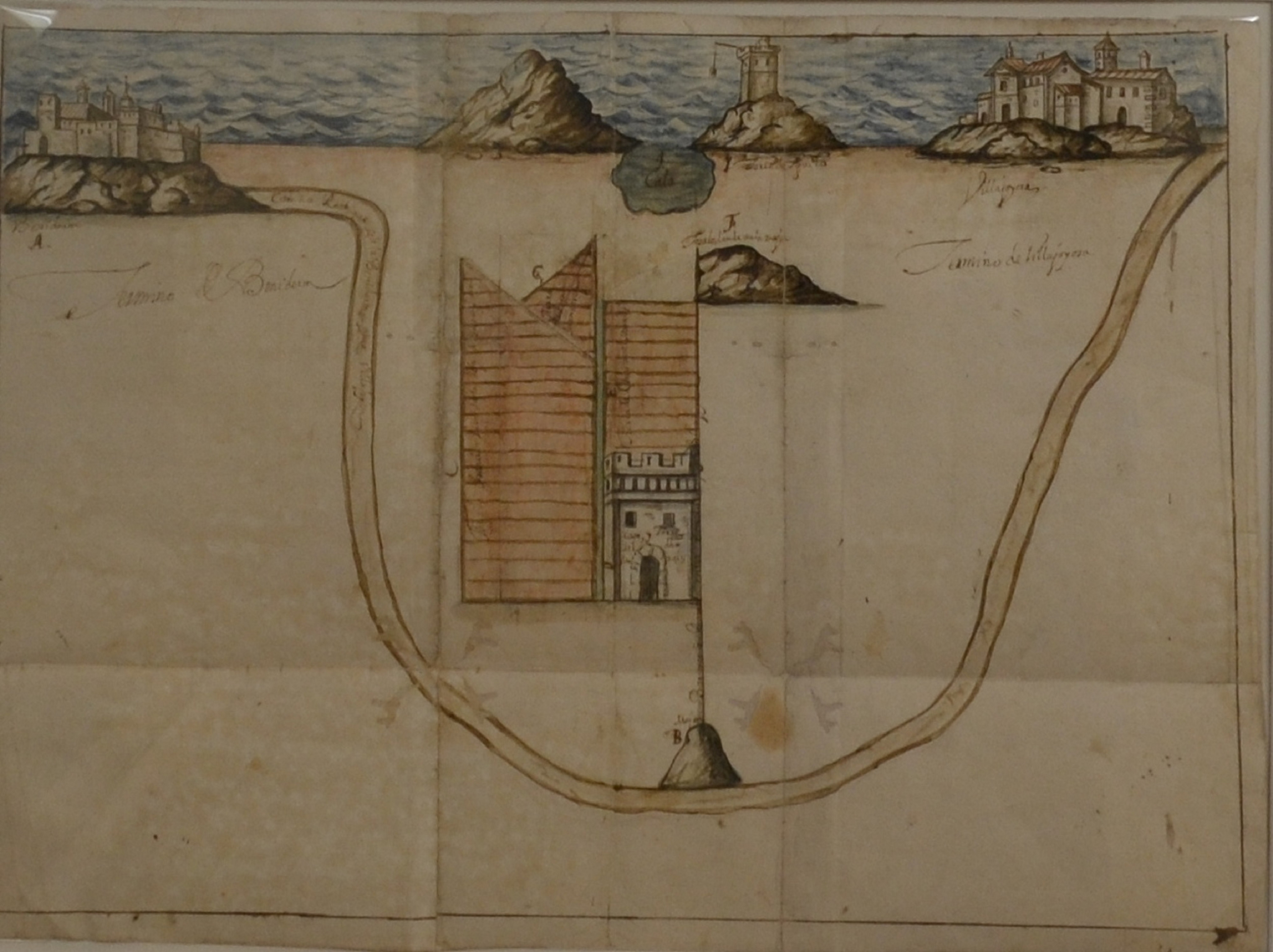 Mapa de la costa entre Benidorm i la Vila Joiosa amb detalls de les terres de Francesc Joan Llorca i Cristòfol Morales, amb vinyetes dels castells de la Vila Joiosa i Benidorm i la Torre d'en Aguiló (1717). ARV: Mapes i plànols, núm. 1. Arxiu del Regne de València.